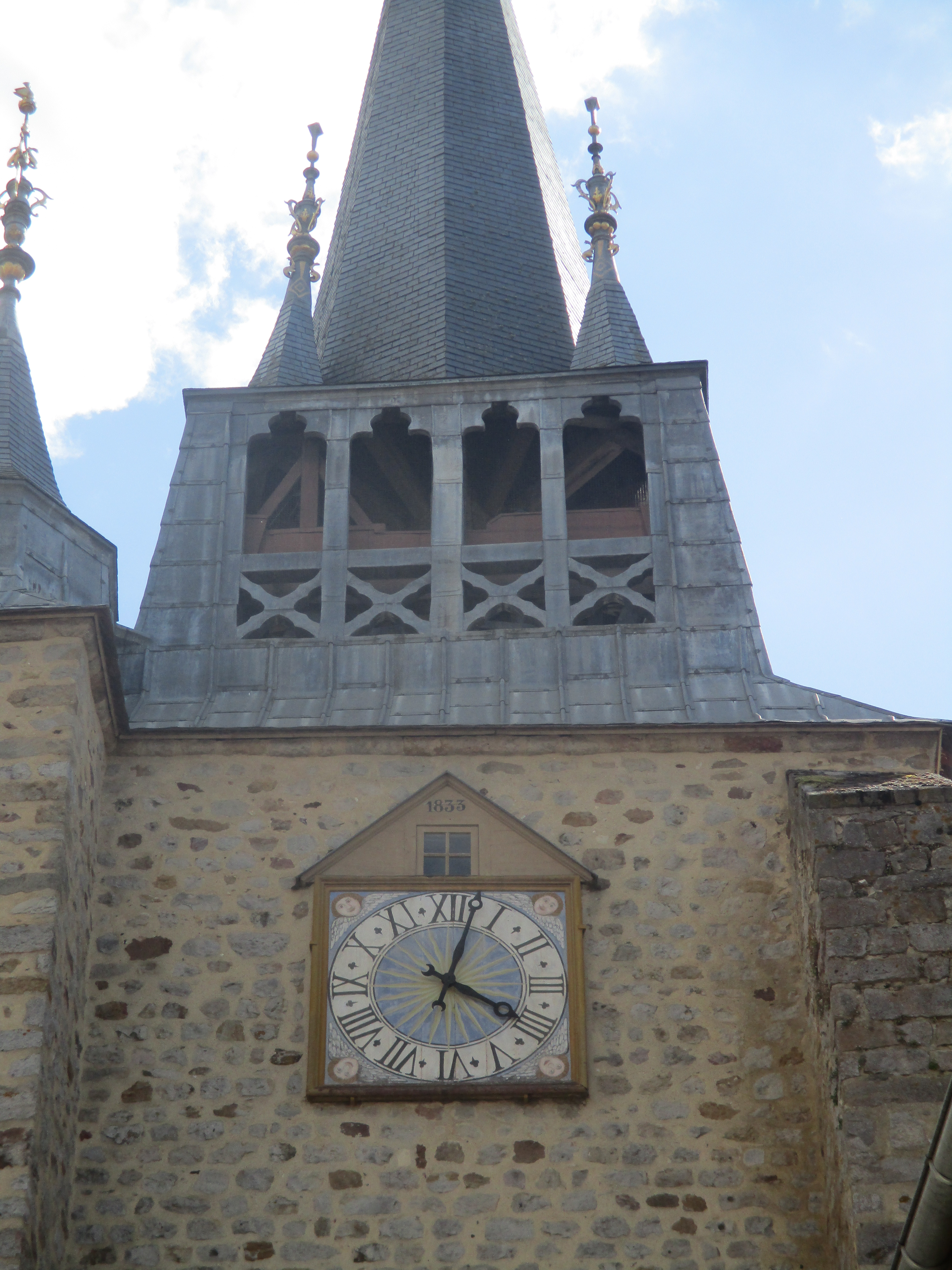 Église Notre-Dame de Villeneuve-l'Archevêque